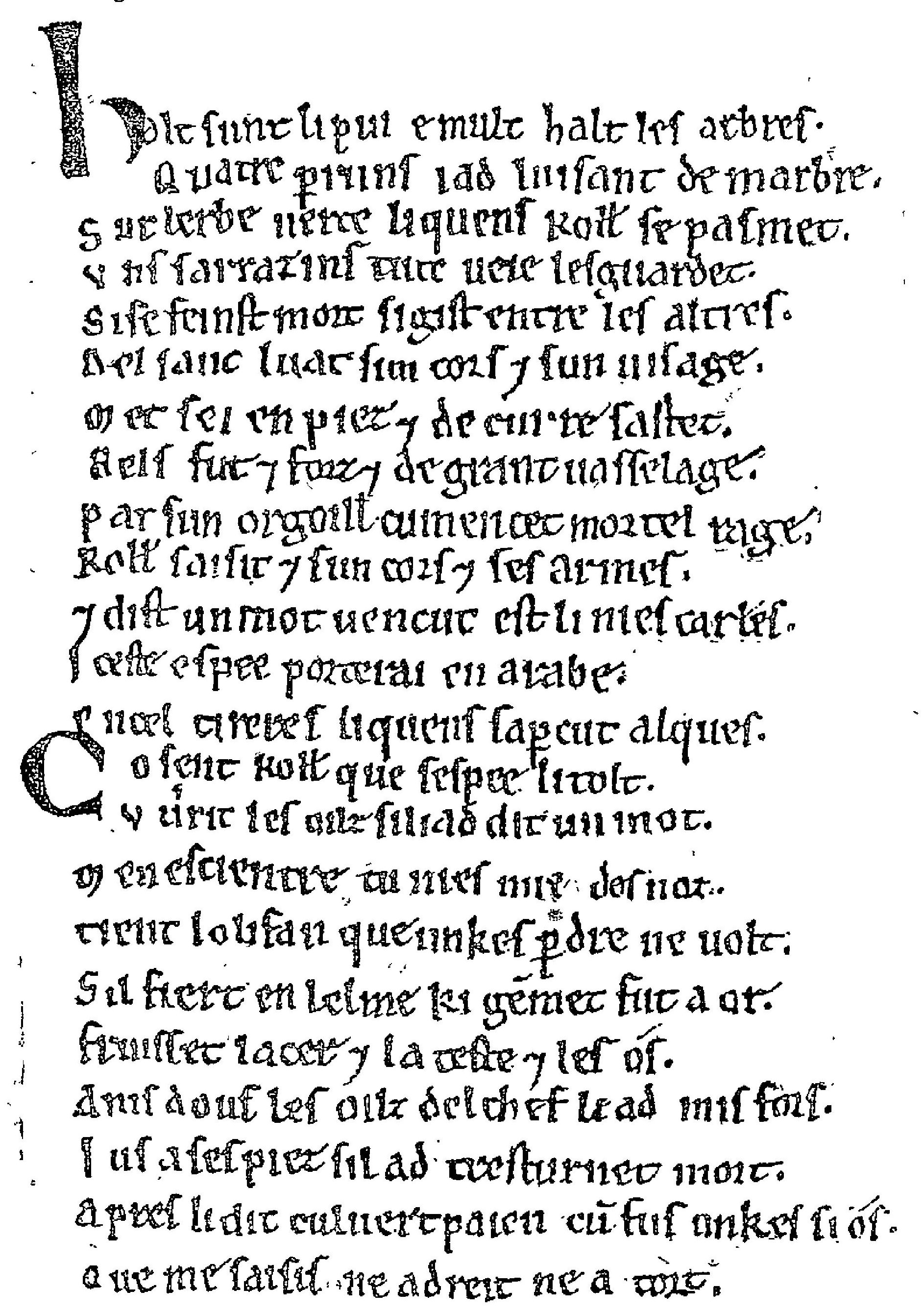 Image de "La Chanson de Roland", onzième édition de 1881, page 401, Léon Gautier. Fac-simile d'une page du manuscrit d'Oxford